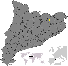 Localització d'Olot. Location of Olot in Catalonia.